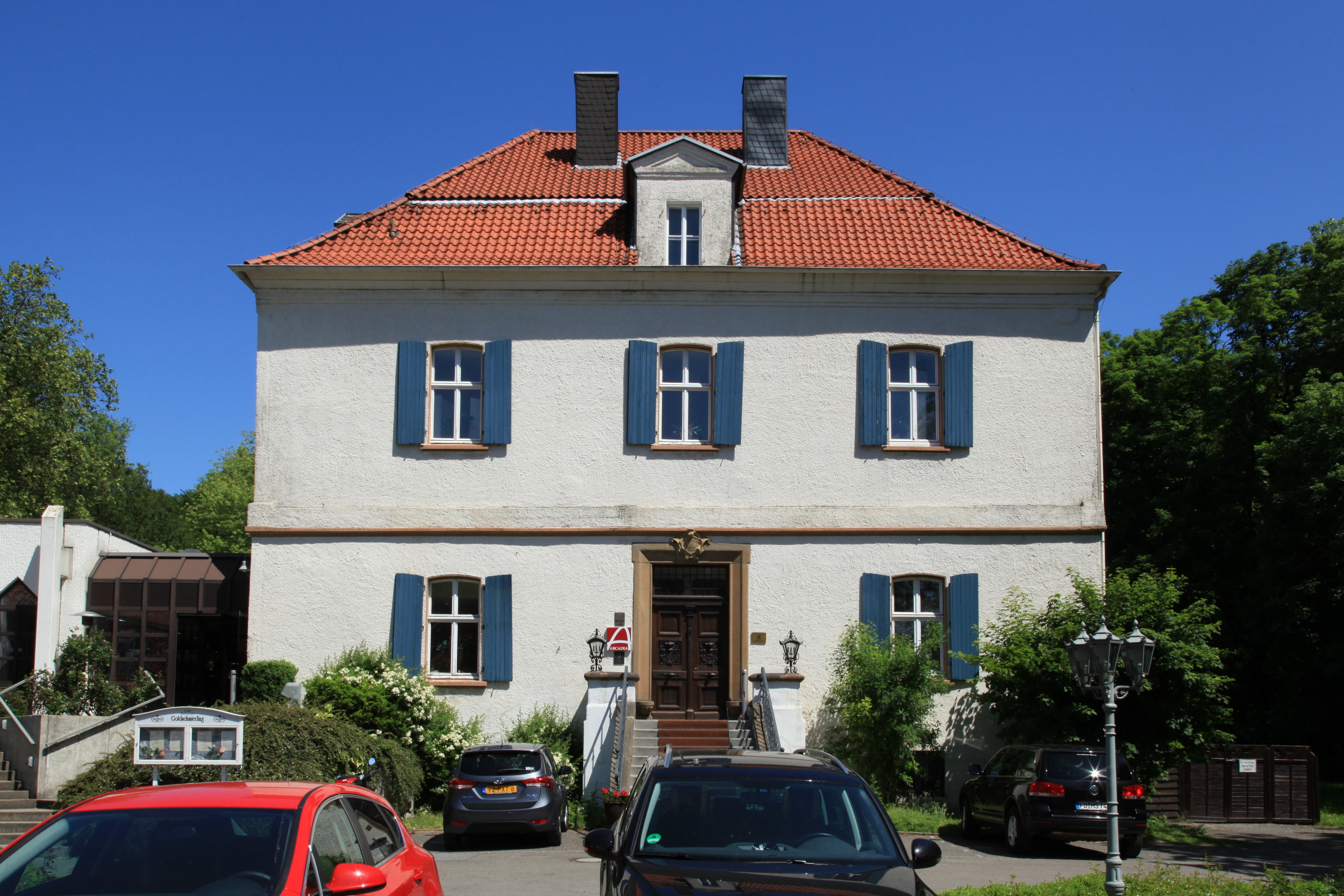 Haus Goldschmieding, jetzt Teil des Arcadia Hotels Goldschmieding, Dortmunder Straße 55 in Castrop-Rauxel